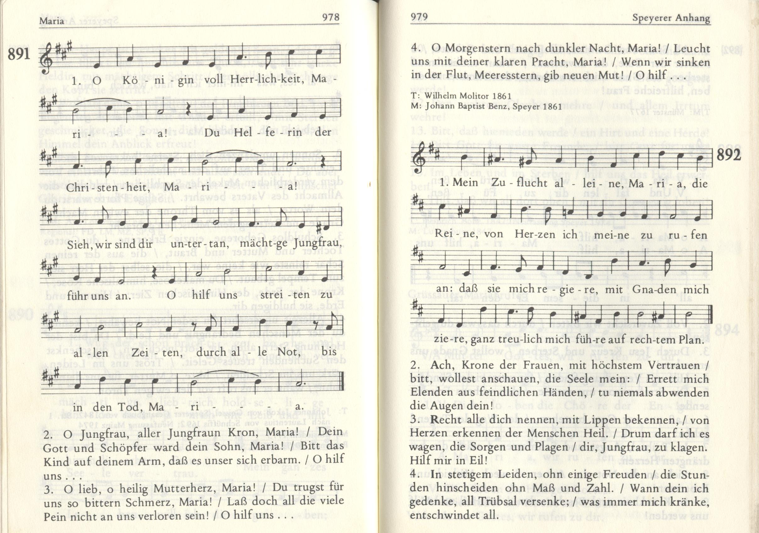 Johann baptist Benz, Komponist, Speyer, Kirchenlied, Melodie von ihm